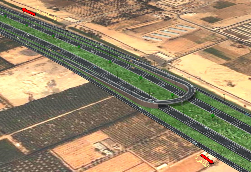 صورة ثلاثية الأبعاد لكوبري مقترح خلال تطوير الطريق